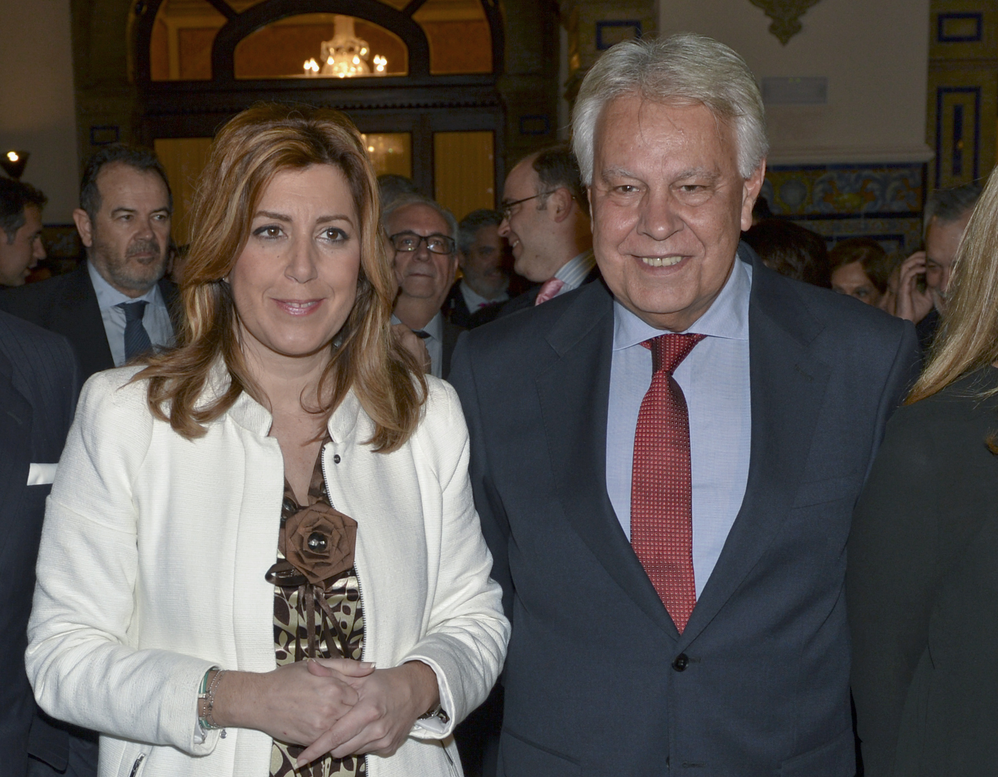 15.01.29 Premio aFelipe Glez 2